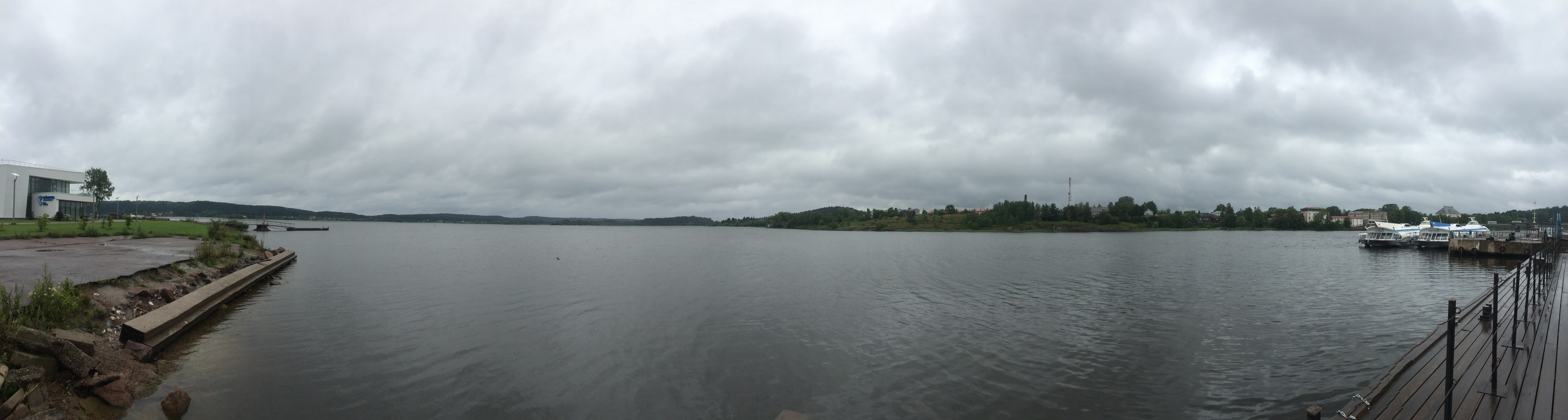 Ляппяярви